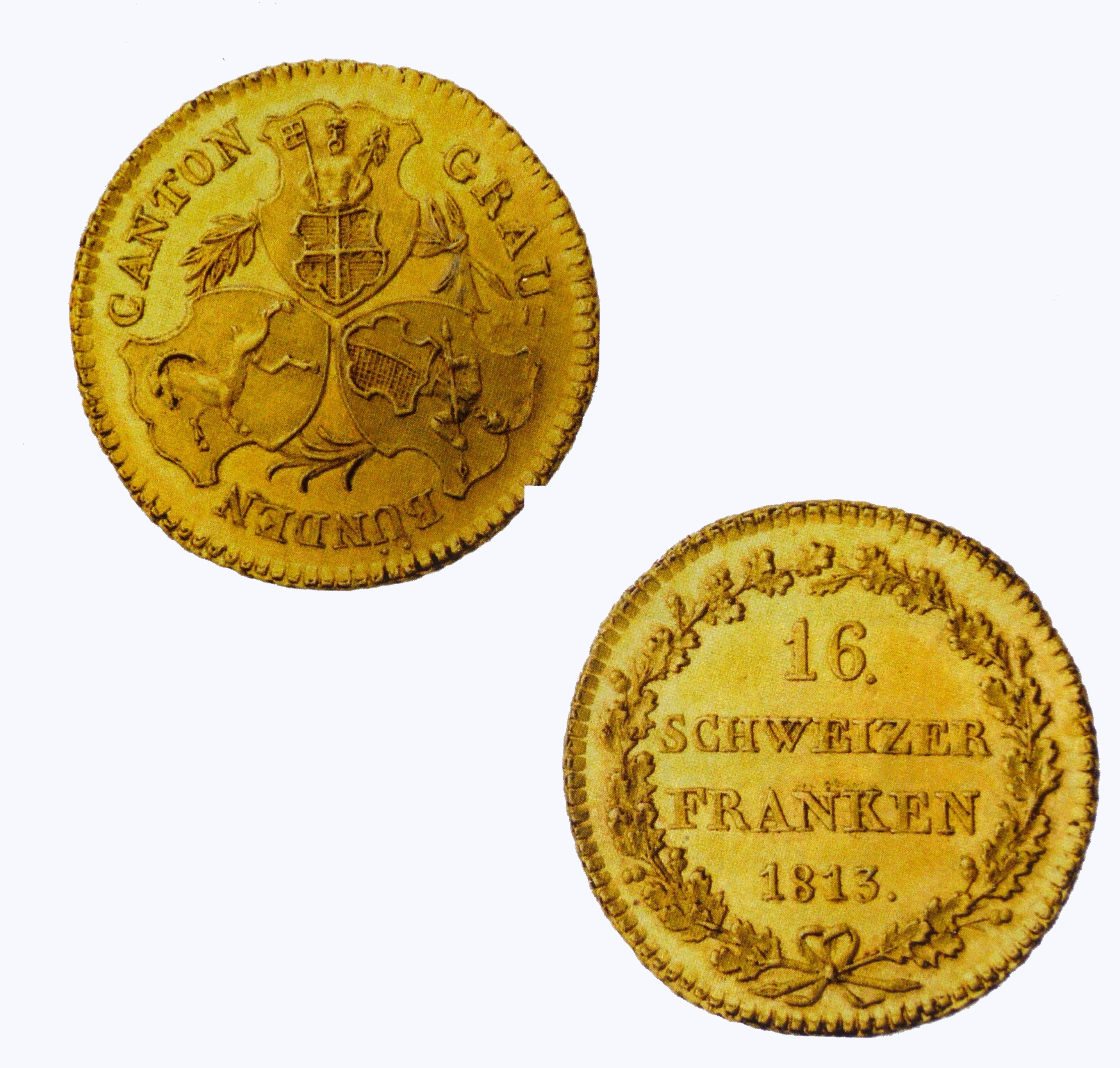 Vor- und Rückseite der Dublonen aus Calandagold als 16. Schweizer Franken Münze. Das Gold stammt aus dem ehemaligen Bergwerk Goldene Sonne, 1813.